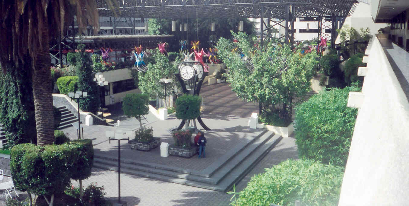 Plaza "La Salle" en epoca Navideña